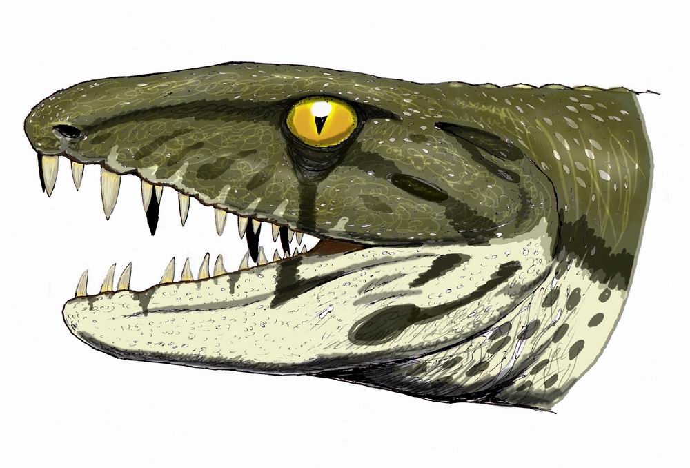 Антракозавр Расселла - Anthracosaurus russelli